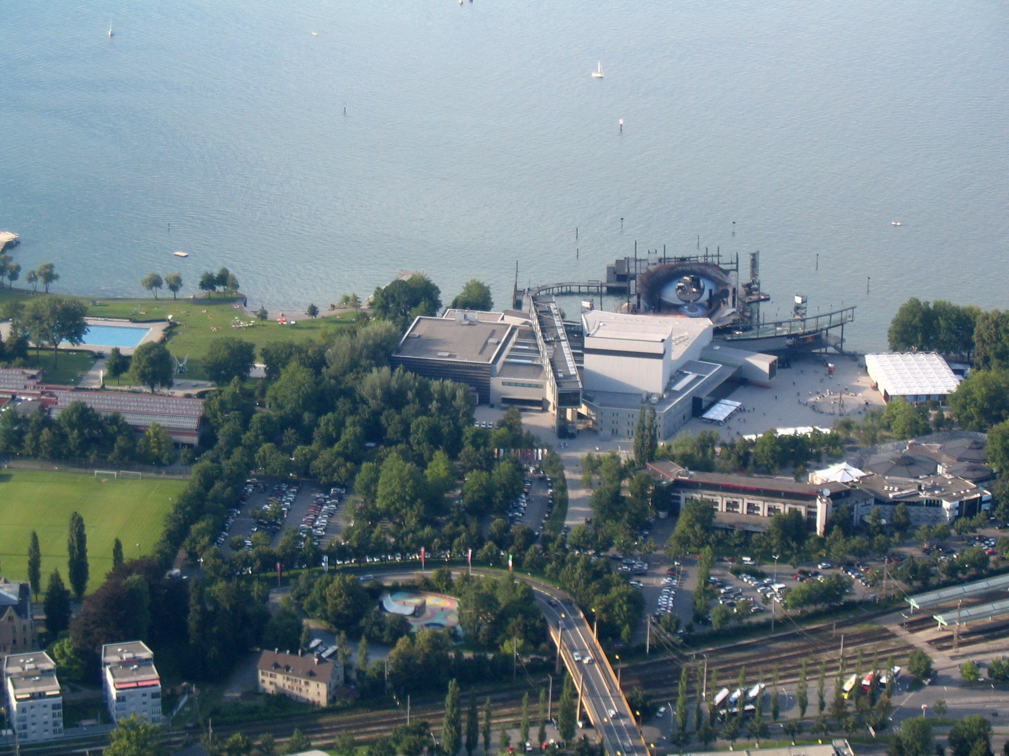 Bregenz, Festspielhaus (mit Bühnenbild zu "Tosca")